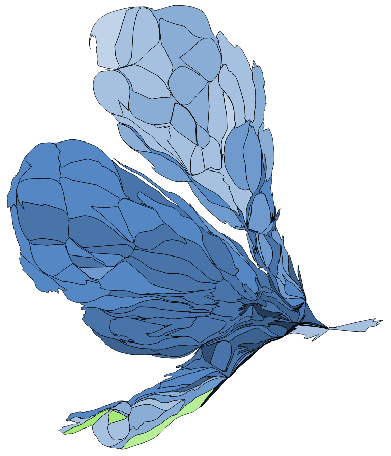 中文（台灣）: 顏色對照表 部分村里因共用投開票所 故圖中部分村里得票為依人口調整後資料